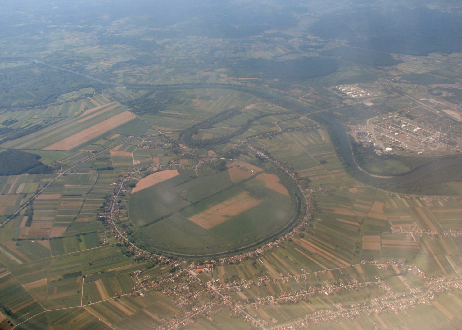 Naselja Budašeo i Topolovac, sisačko-moslavačka županija